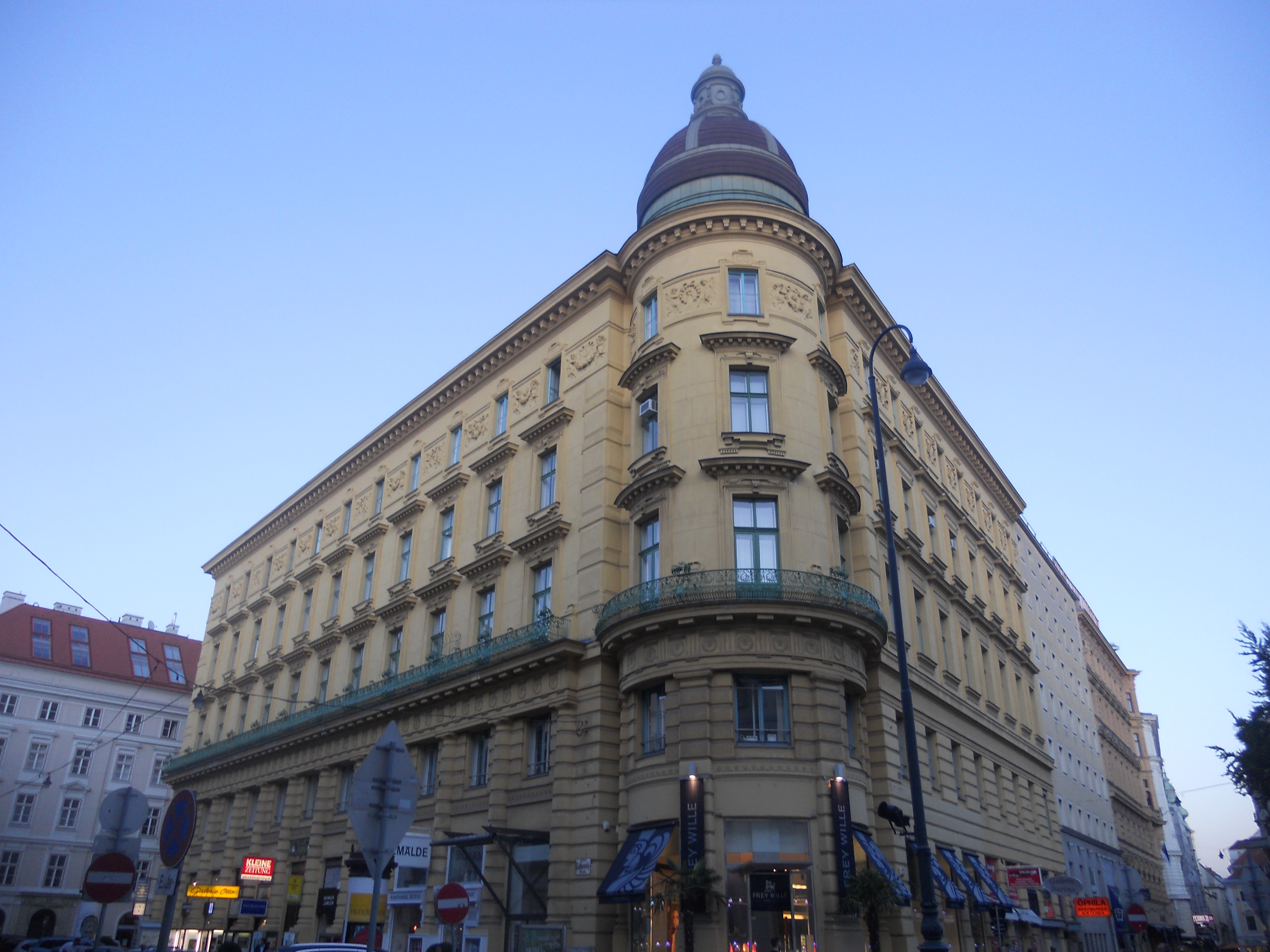 Wohn- und Geschäftshaus Lobkowitzplatz 1